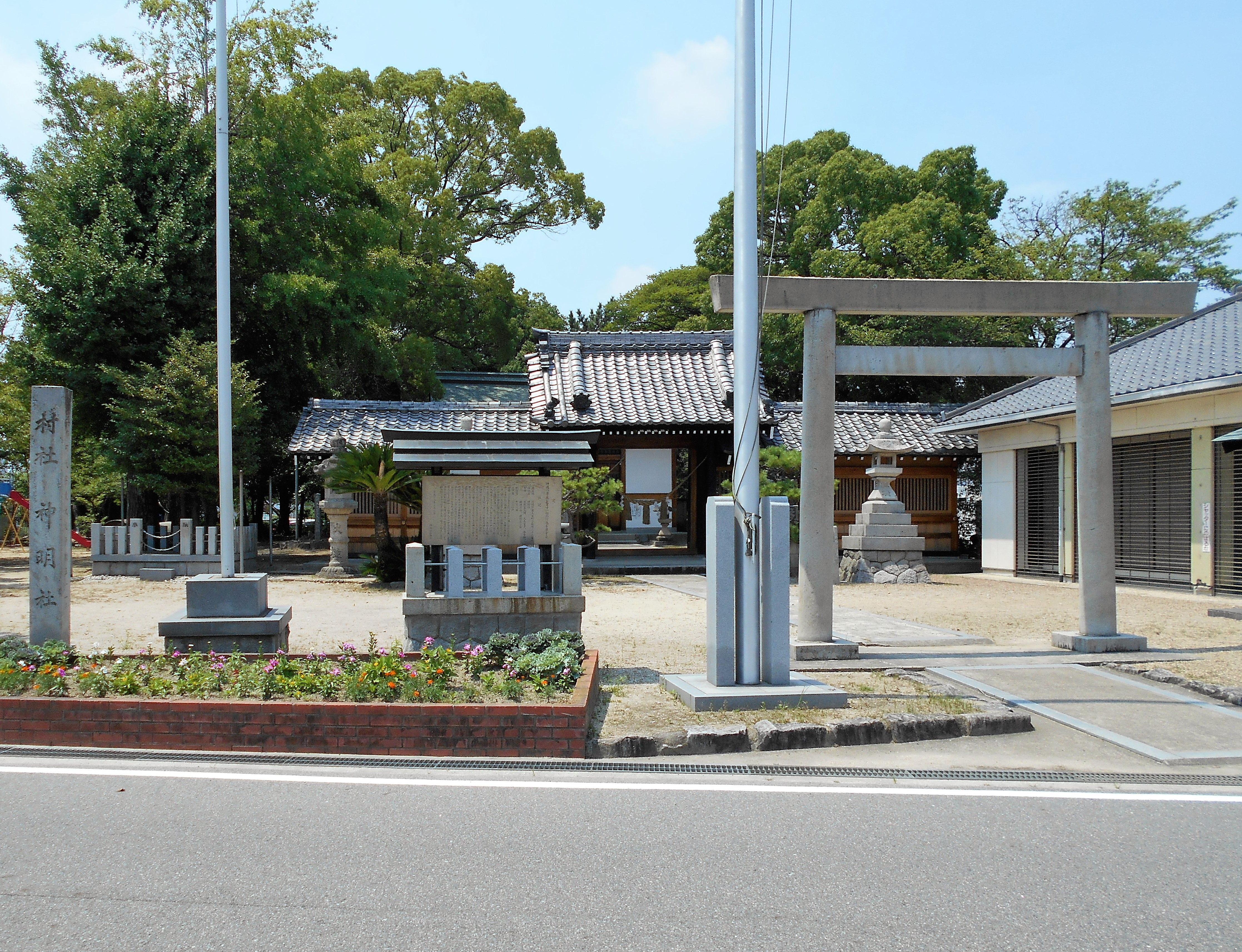 神明社（岡崎市東大友町、2018年7月撮影）、祭神は天照大神・大友皇子ほか五柱